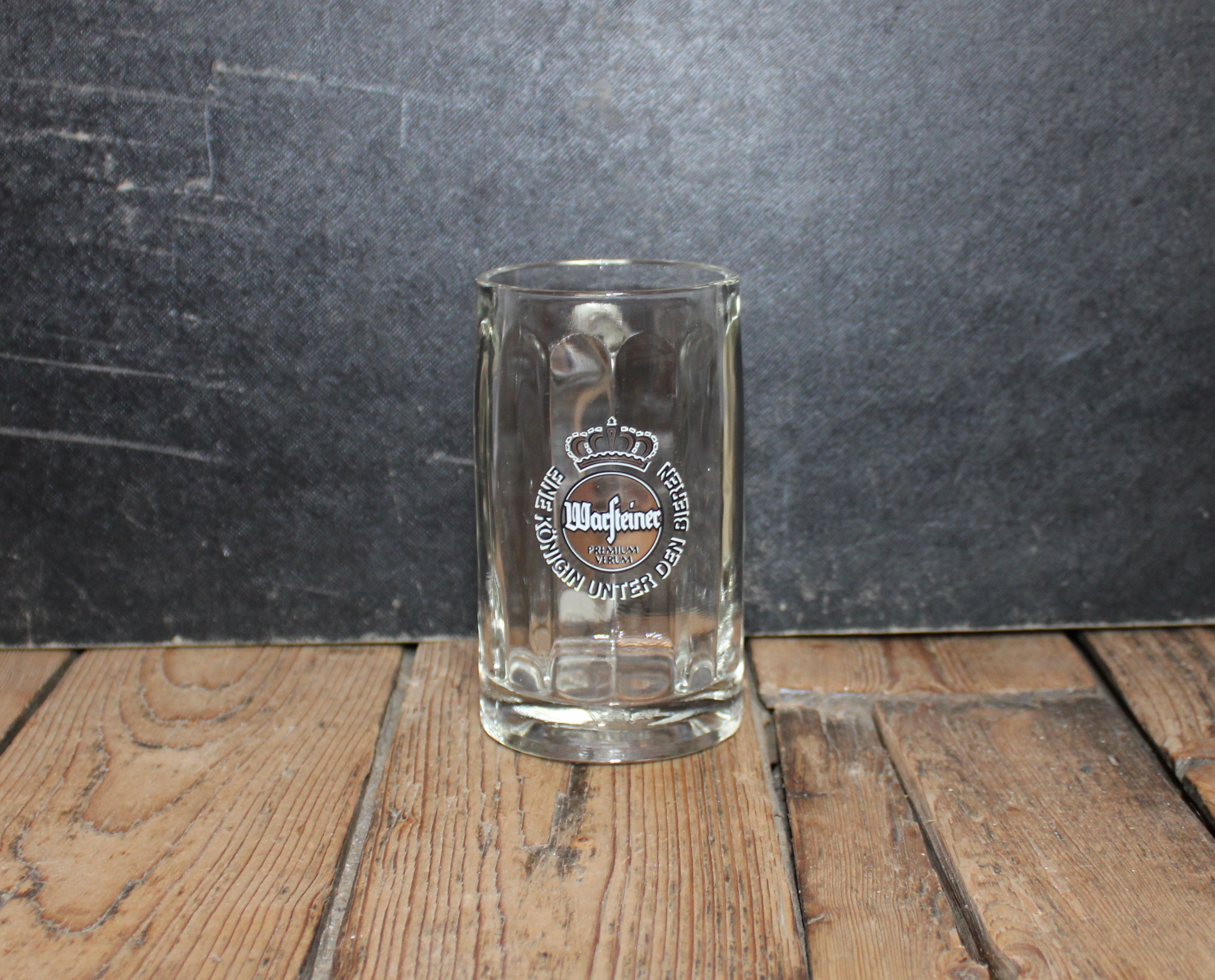 Verre à bière Warfsteiner Premium Verrum Bock